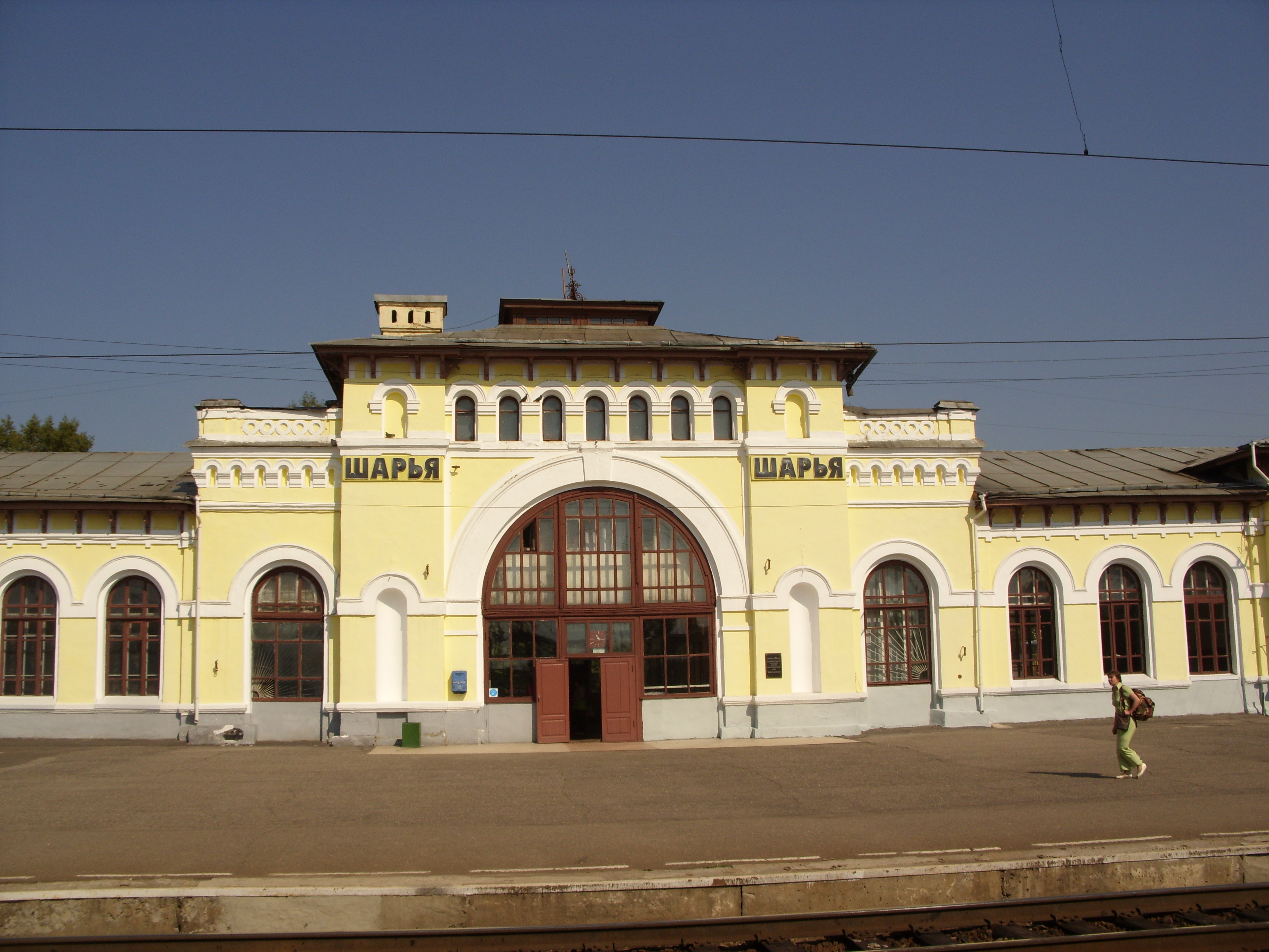 Stanice Šarja v Kostromské oblasti, Rusko